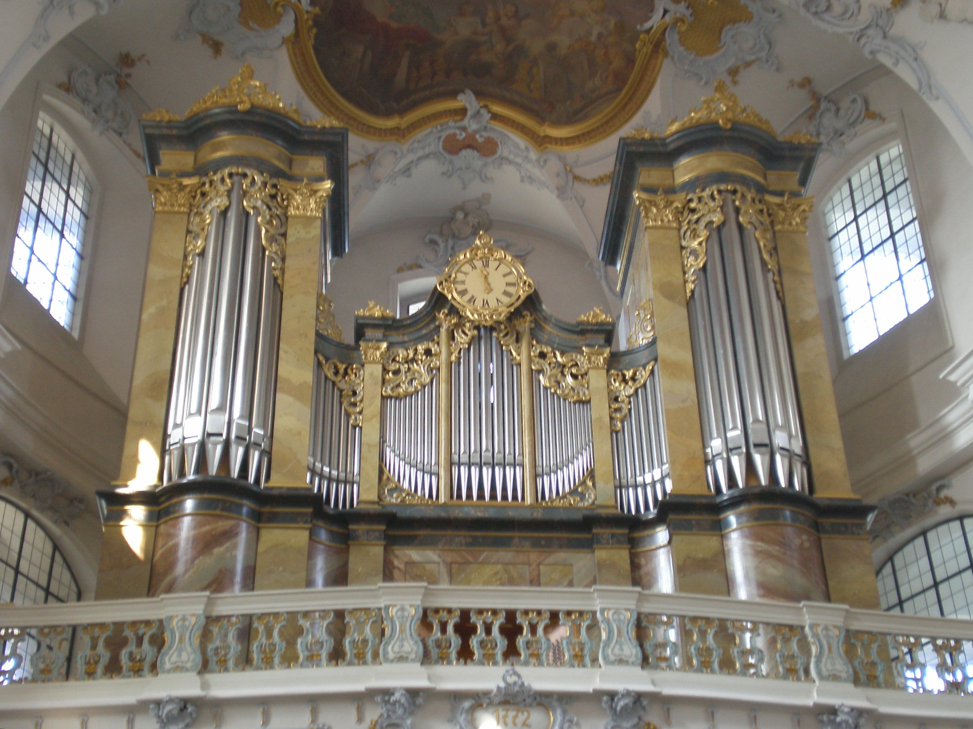 Rieger-Orgel der Basilika Vierzehnheiligen